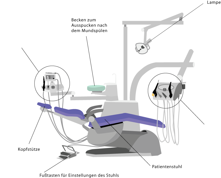 Stuhl02 2